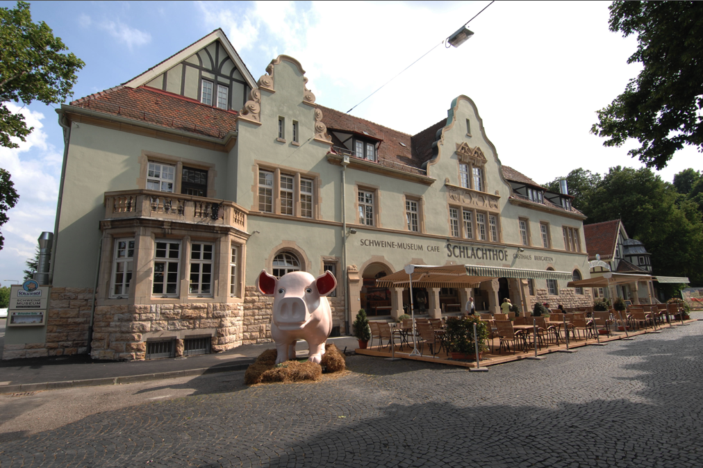 Schweinemuseum im alten Stuttgarter Schlachthof